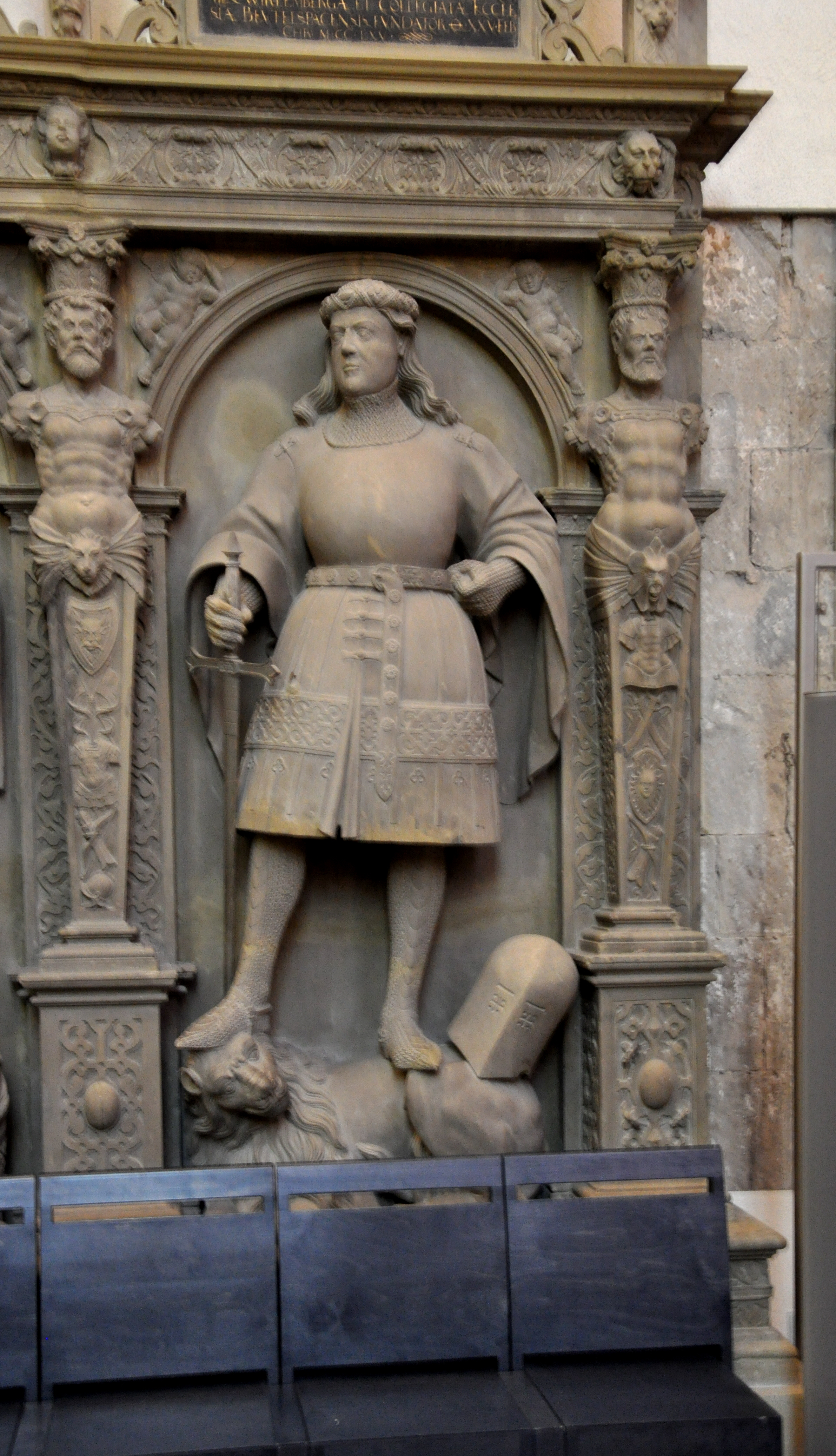 Stuttgart, Chor der Stiftskirche, Grafenstandbilder von Sem Schlör (ab 1576 entstanden zum Ersatz der ursprünglichen Epitaphe der in der Stiftskirche beigesetzten Grafen von Württemberg) Figur 1 (ganz rechts): Ulrich der Stifter (1234–1265)